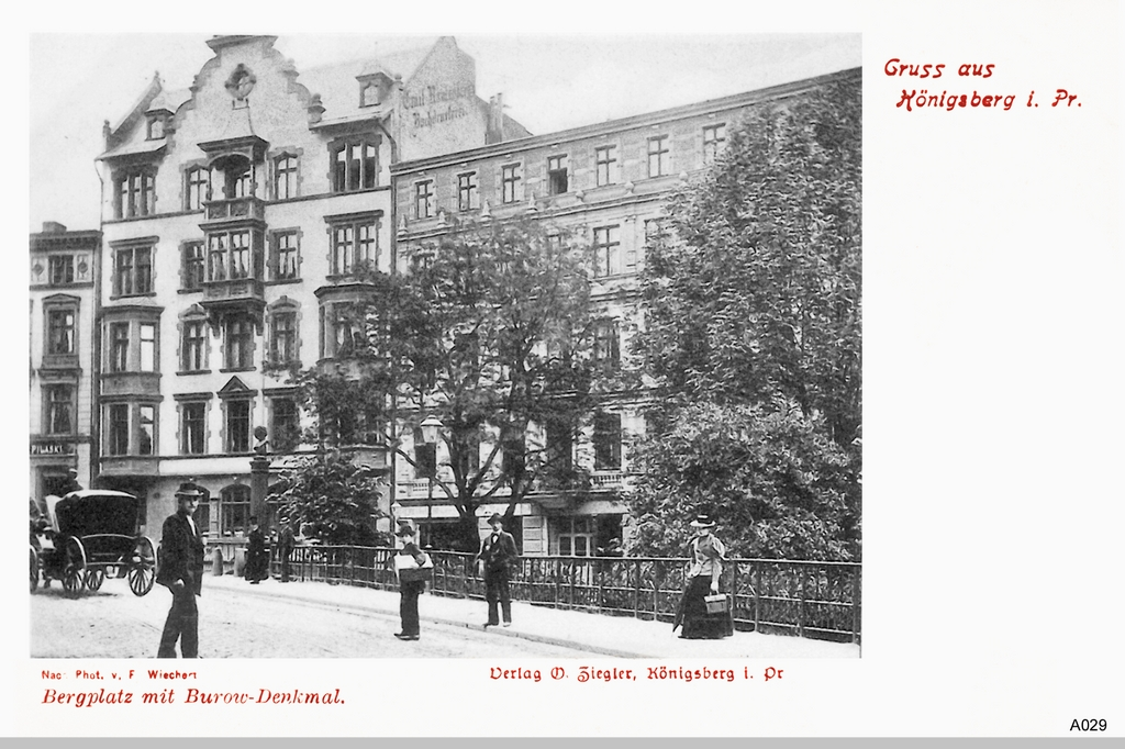 Königsberg